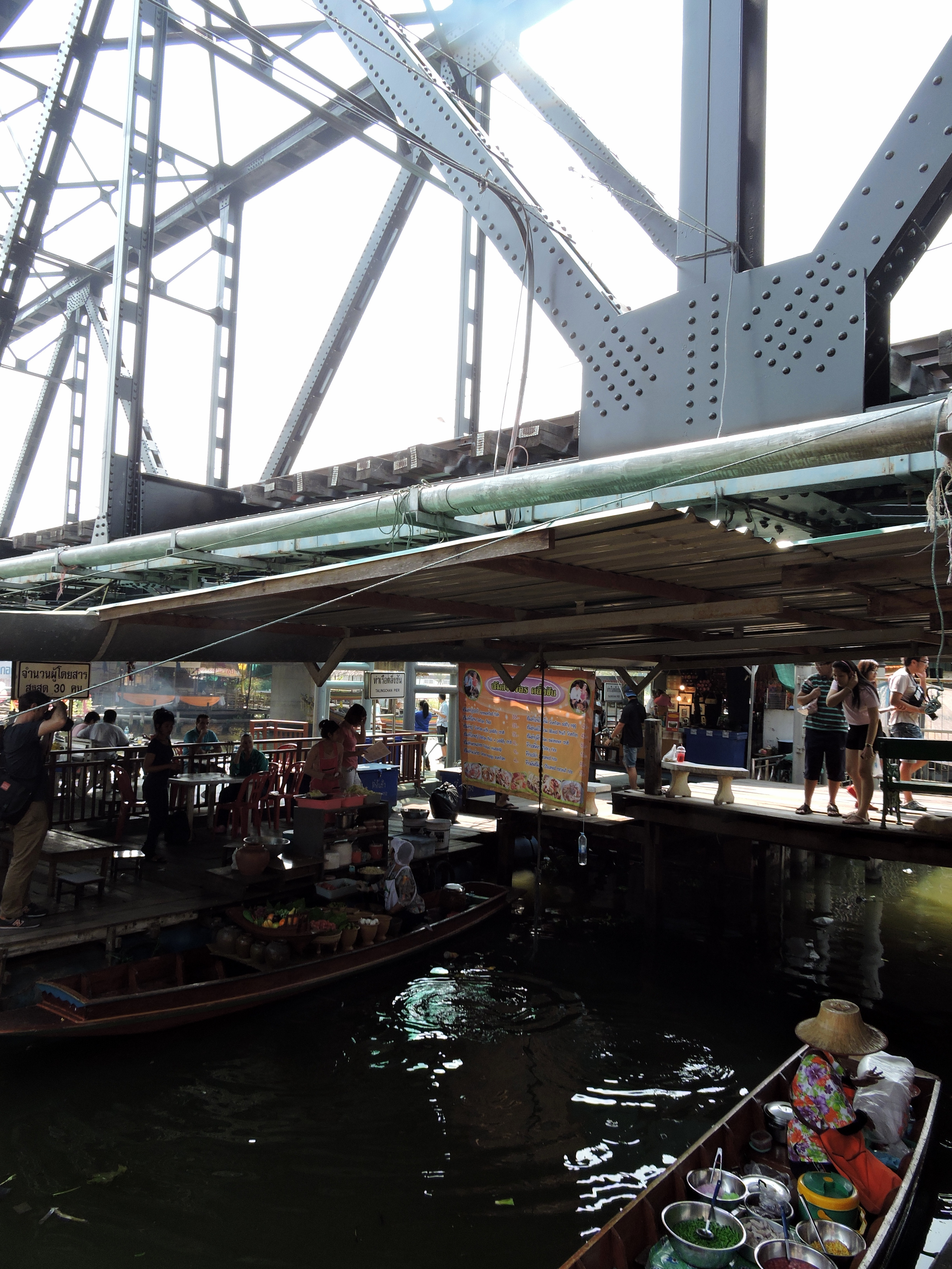 Khlong Chak Phra, Taling Chan, Bangkok, Thailand